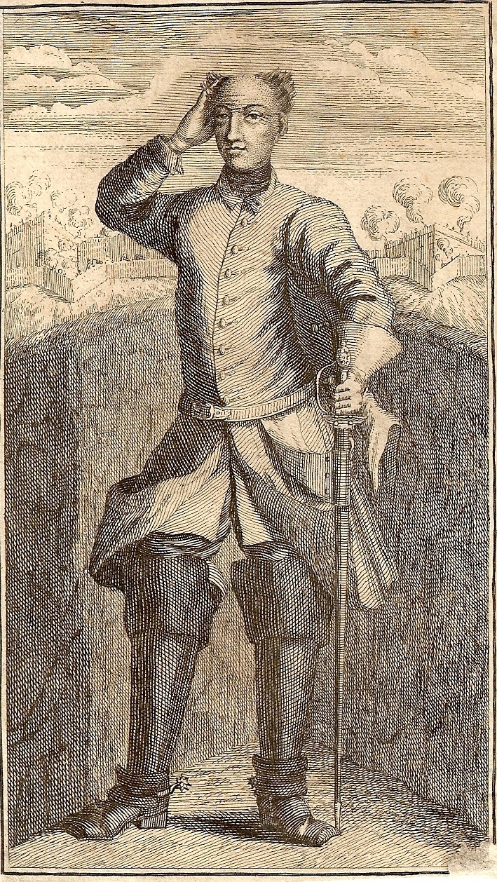 Карл XII Правитель Швеции.Carl XII the lord of Sweden